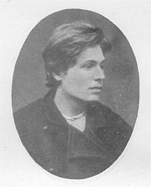 Пресняков Андрей Корнеевич - русский революционер, член партии "Народная воля"